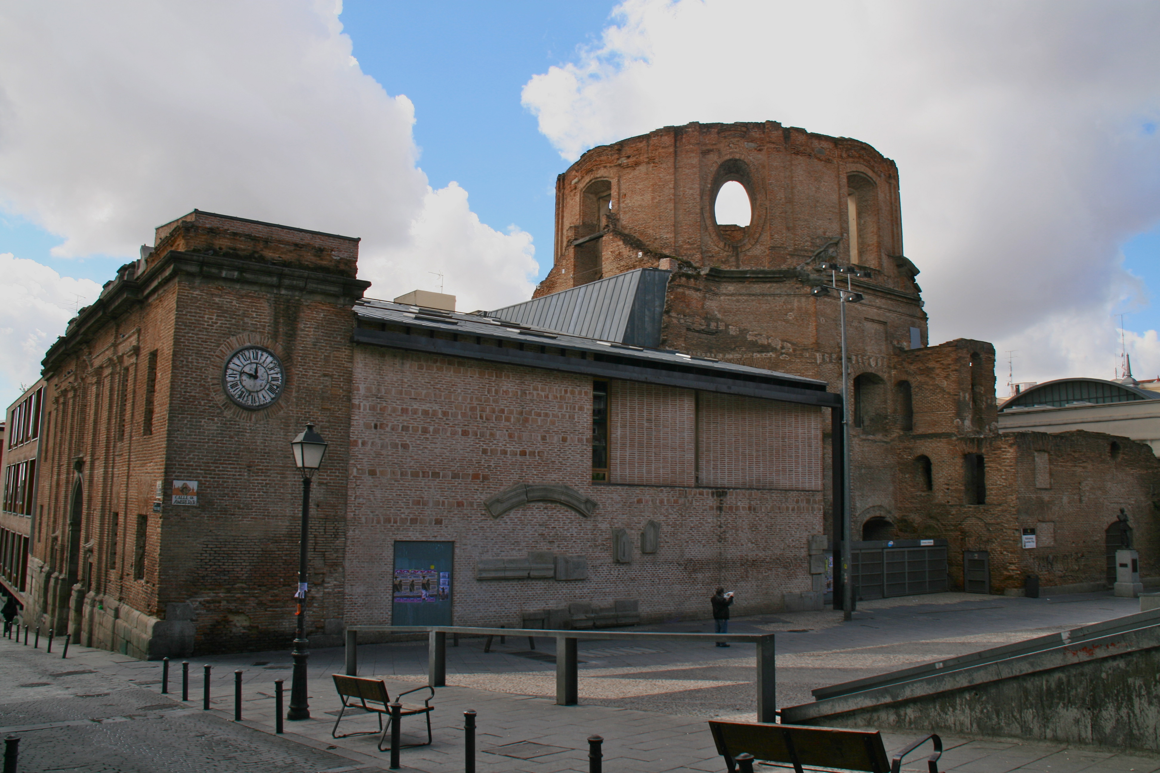 Colegio de las Escuelas Pías de San Fernando